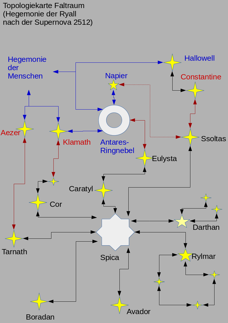 Eine Faltraumkarte aus Der Antares-Krieg.